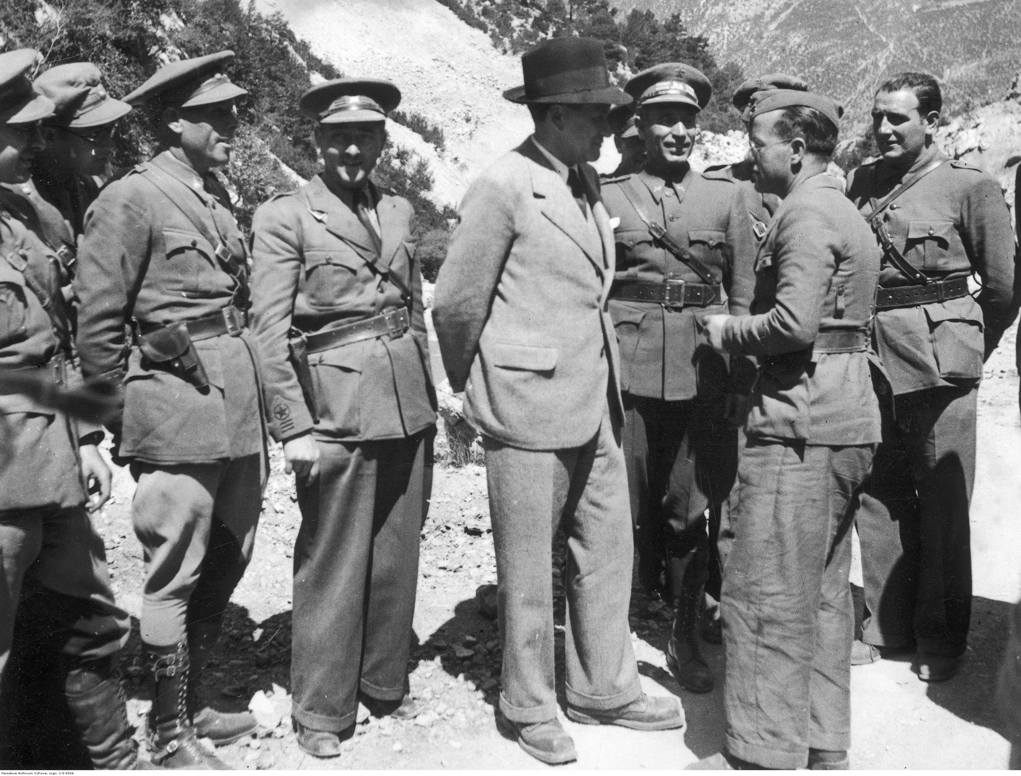 El ministro sin cartera Manuel de Irujo visita a las tropas republicanas cercadas en la Bolsa de Bielsa. A su lado aparece el comandante de la 43.ª División, Antonio Beltrán, y otros oficiales pertenecientes a la unidad.